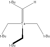 Exemple típic de un carbé de Schrock